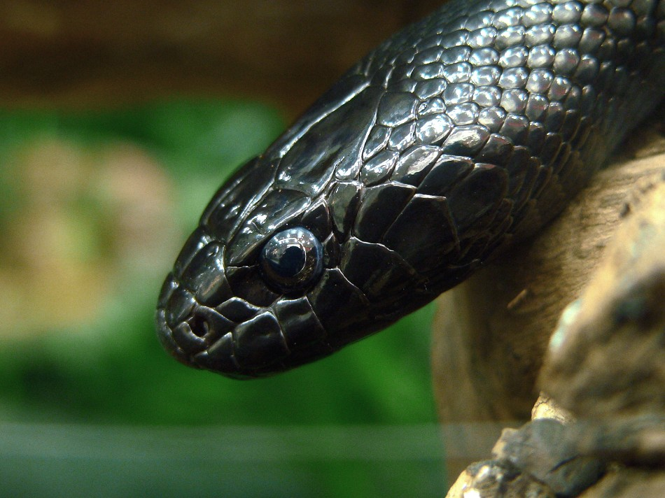 Schwarze Kettennatter - variété noire de Lampropeltis californiae, anciennement Lampropeltis getula nigrita